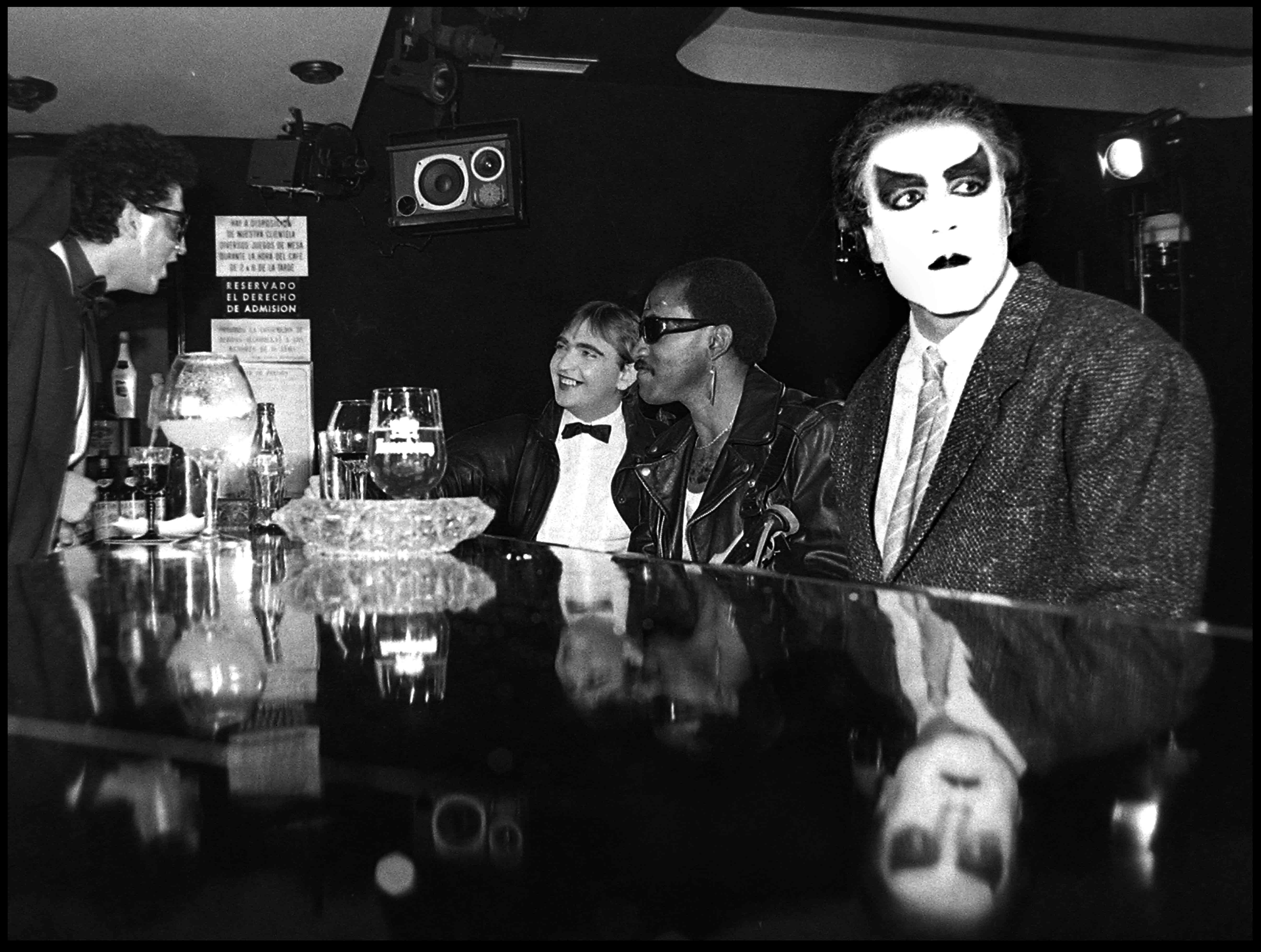 Algunos componentes de Vam Cyborg